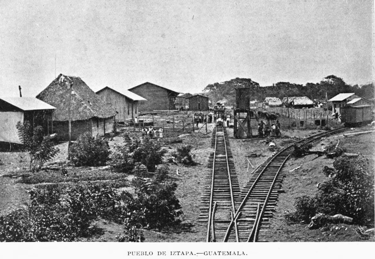 Terminal de ferrocarrill en Iztapa en 1897.